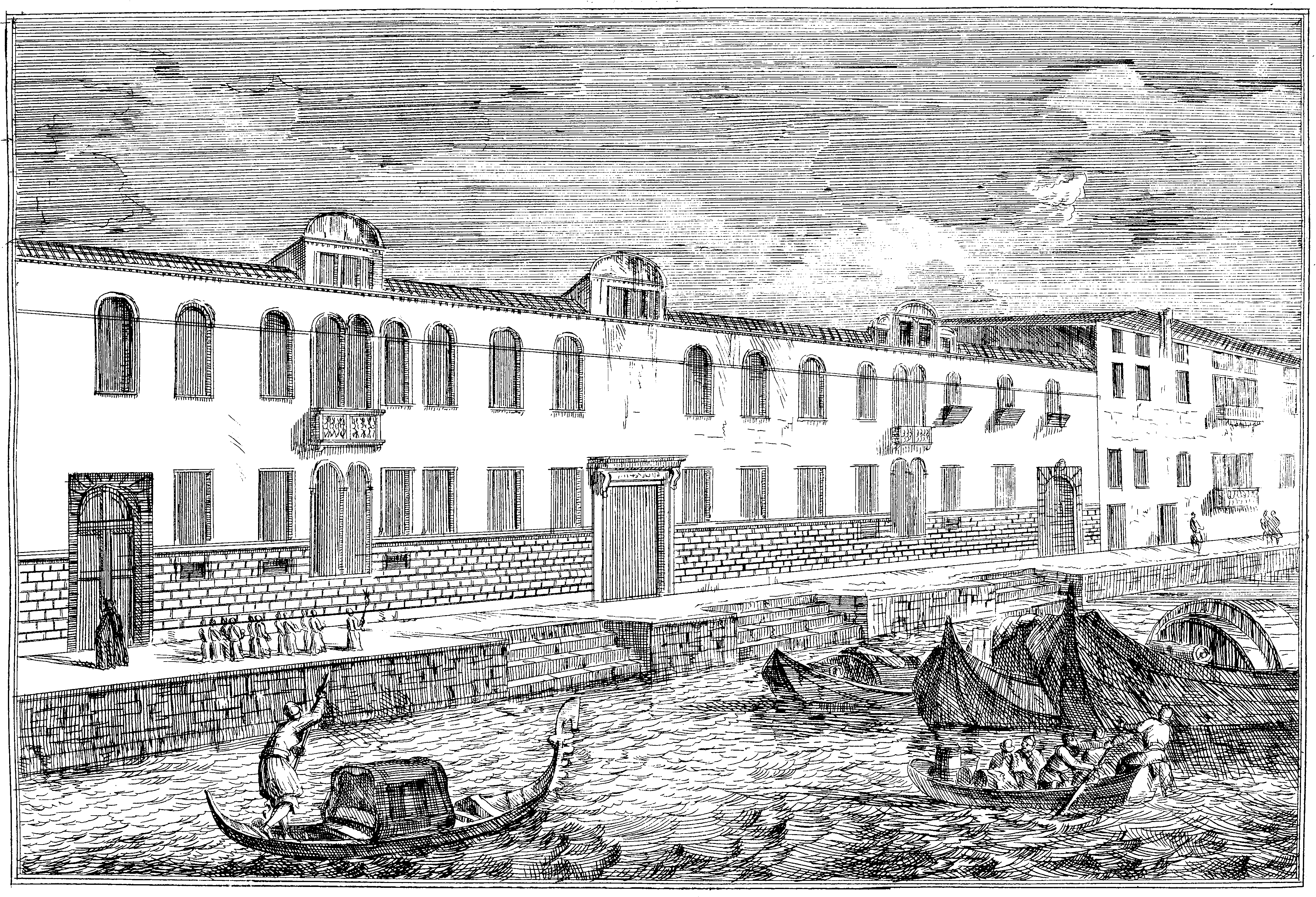 Veduta dell'Ospedale Degli Incurabili